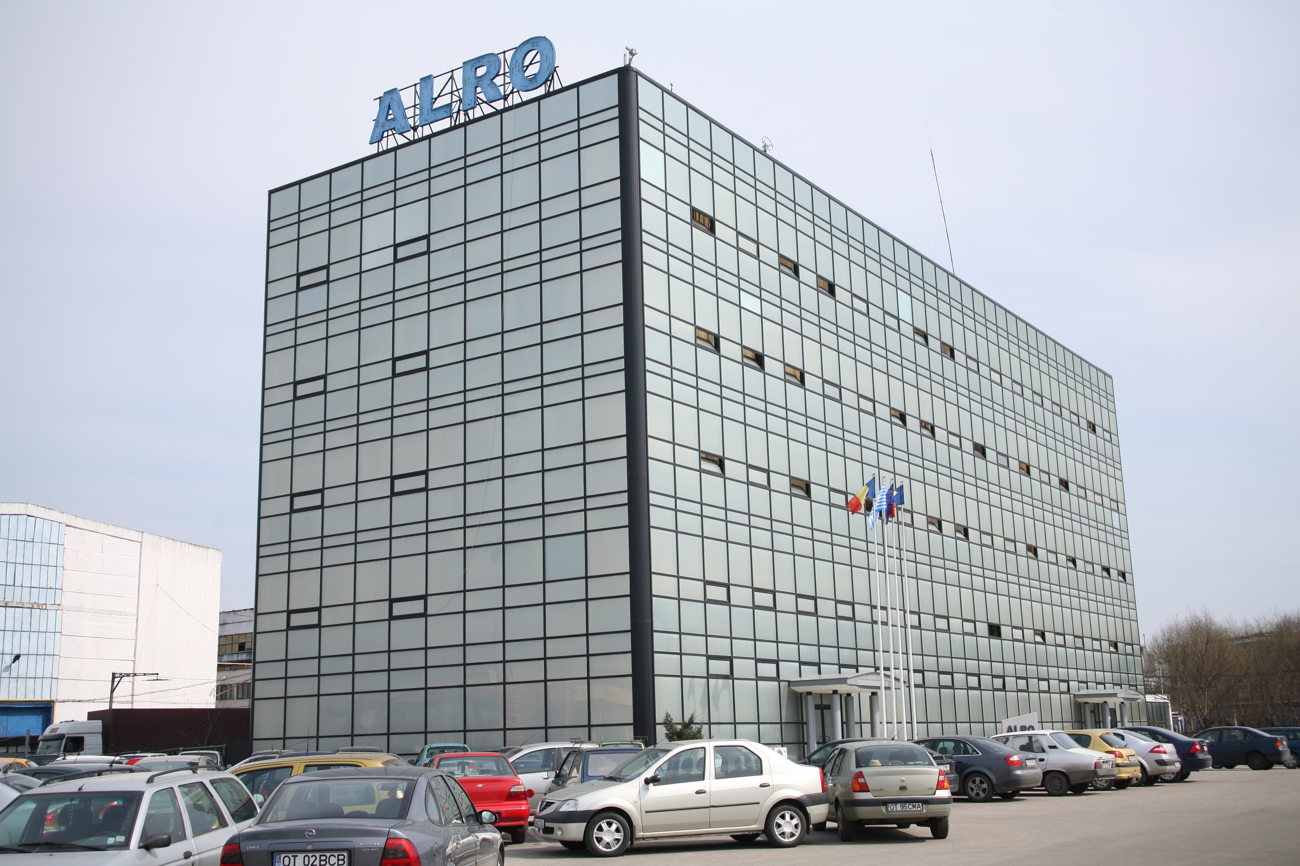 Штаб-квартира компании Alro S.A. в г. Слатина (Румыния) - крупнейшего предприятия по производству алюминия в Центральной и Восточной Европе (кроме России), входящего в структуру холдинга "Виметко"